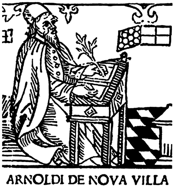 Gravure médiévale d'Arnaud de Villeneuve